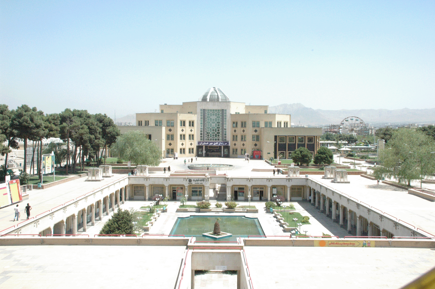 نمای بیرونی ساختمان اصلی فرهنگسرای خاوران در شهر تهران